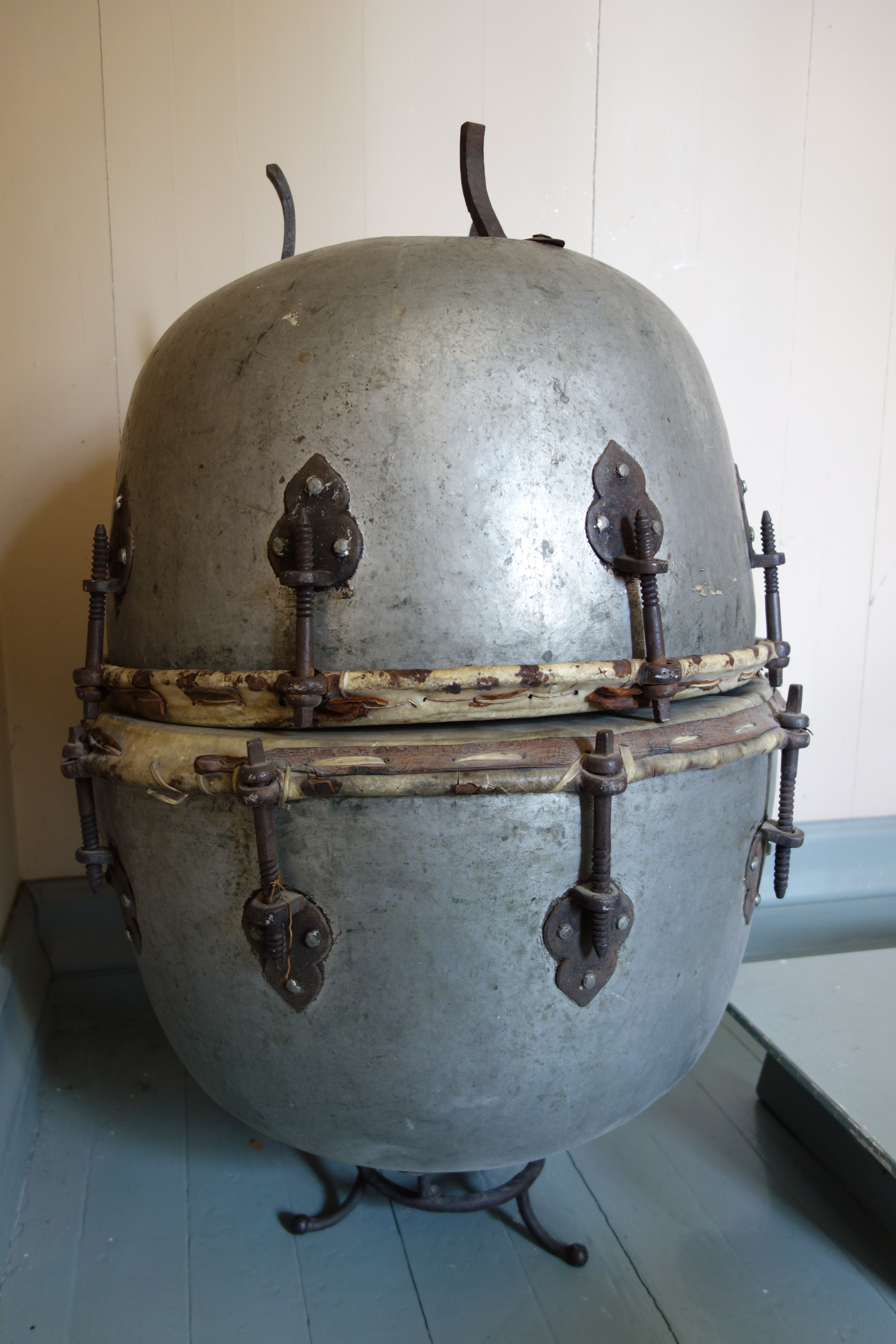 Jakobstads kyrka, västra vapenhuset.